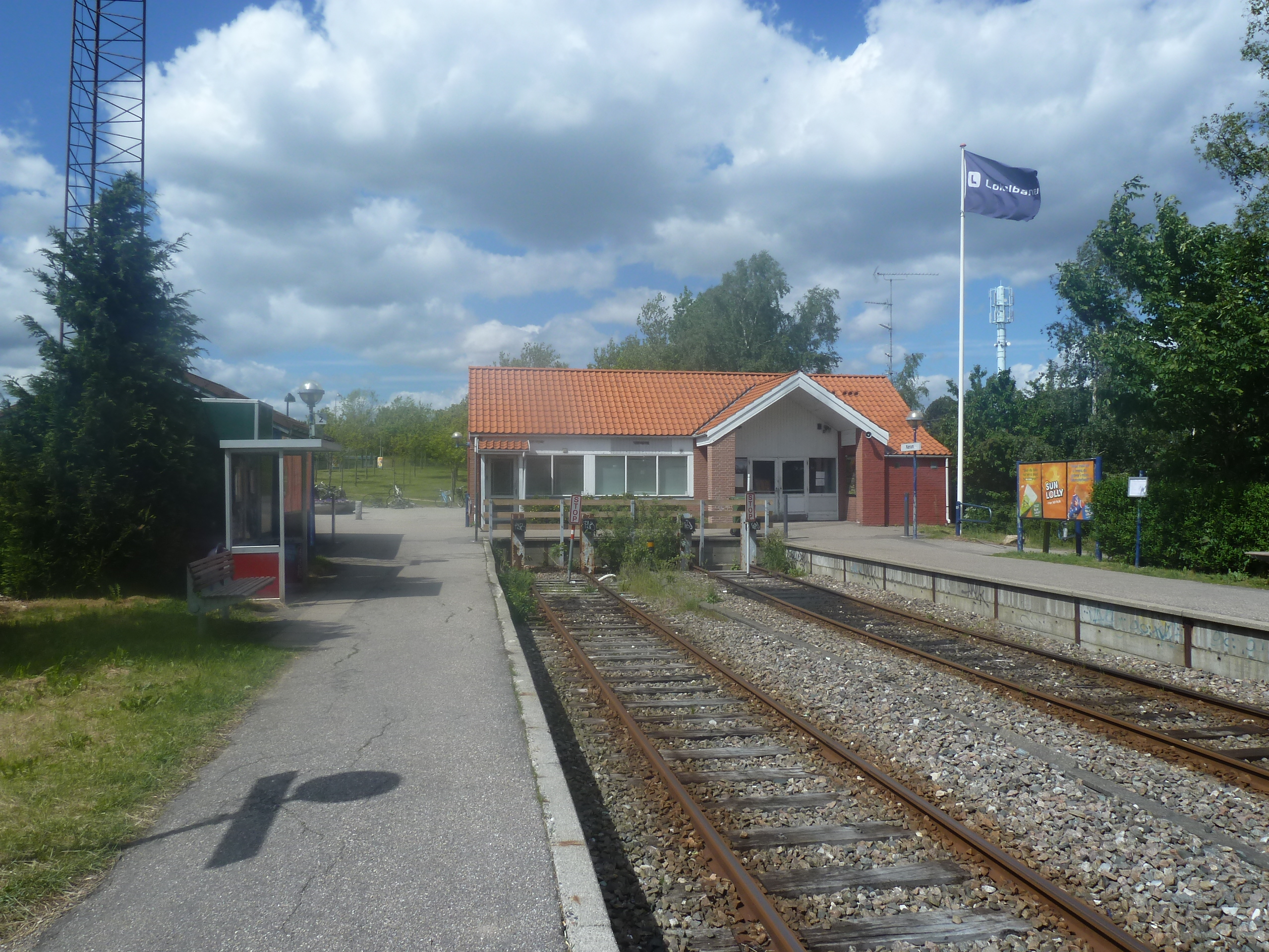 Nærum Station in Denmark.